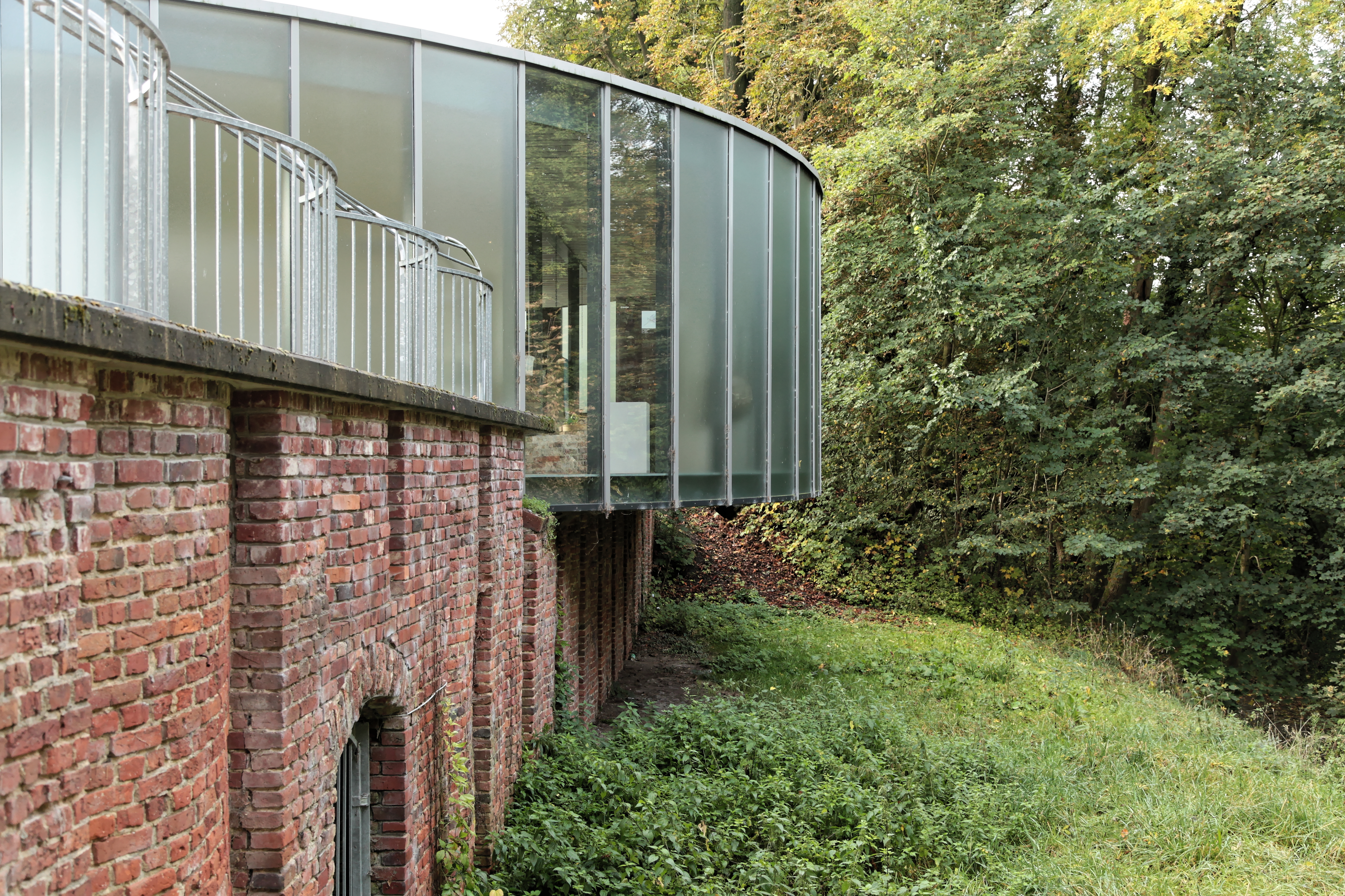 Eiskeller, Gooiker Platz in Altenberge